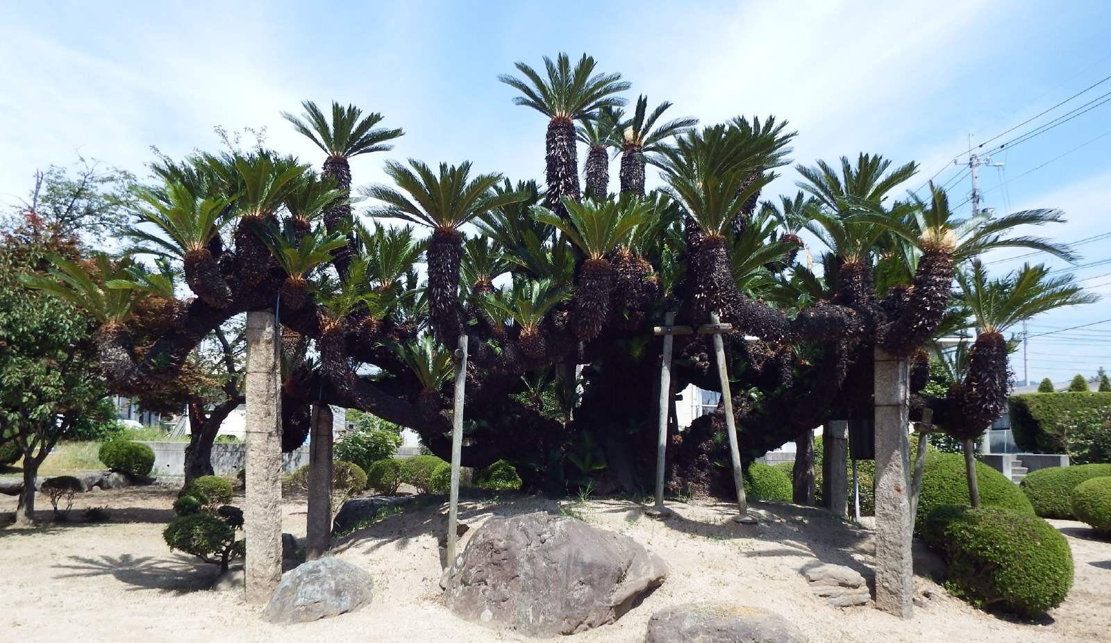 久貢山のソテツ